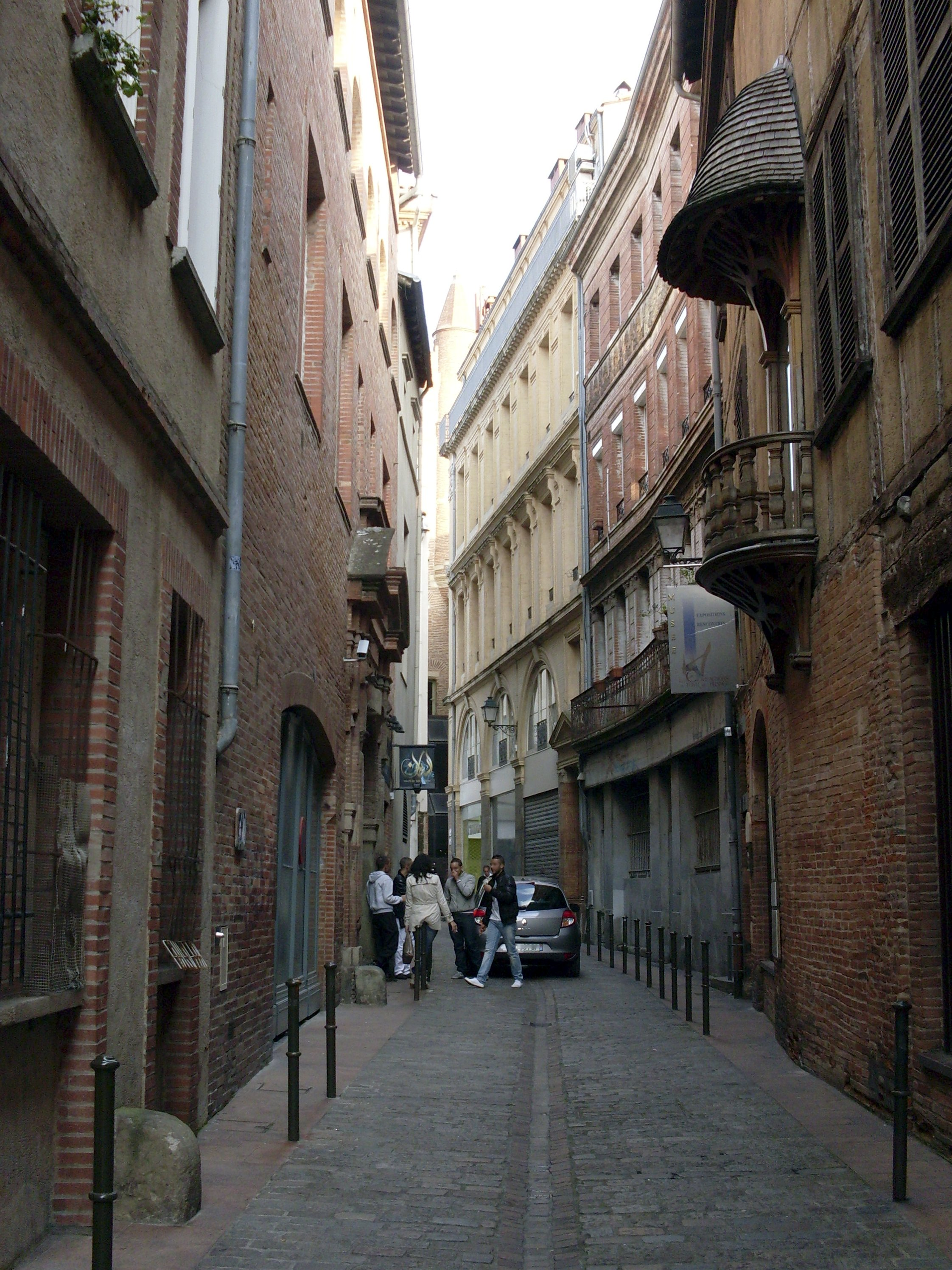 12 rue Tripière à Toulouse (Haute-Garonne, France), façade du 16e siècle, au premier étage un balcon avec l'image sous verre du Père Soubise.